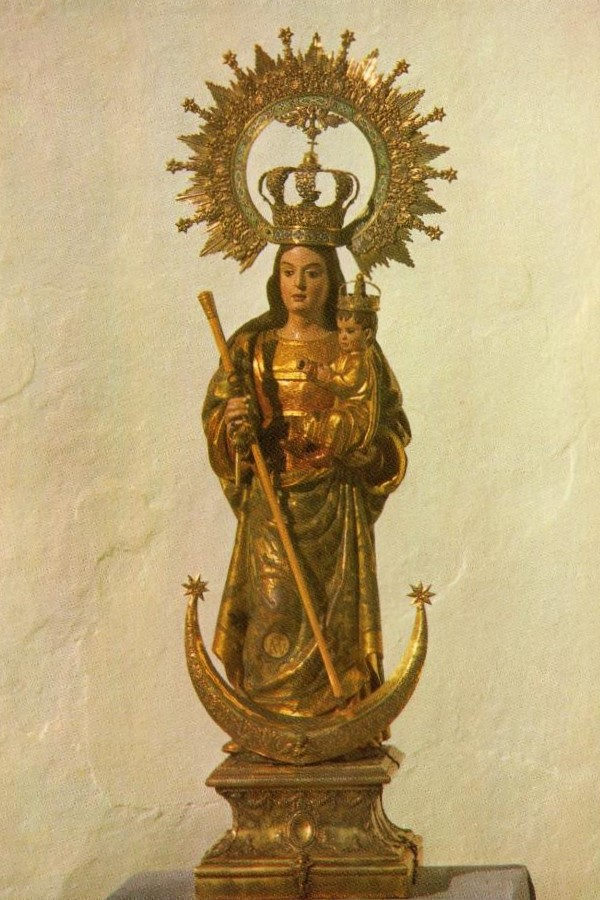 Nuestra Señora de la Coronada, patrona de Villafranca de los Barros